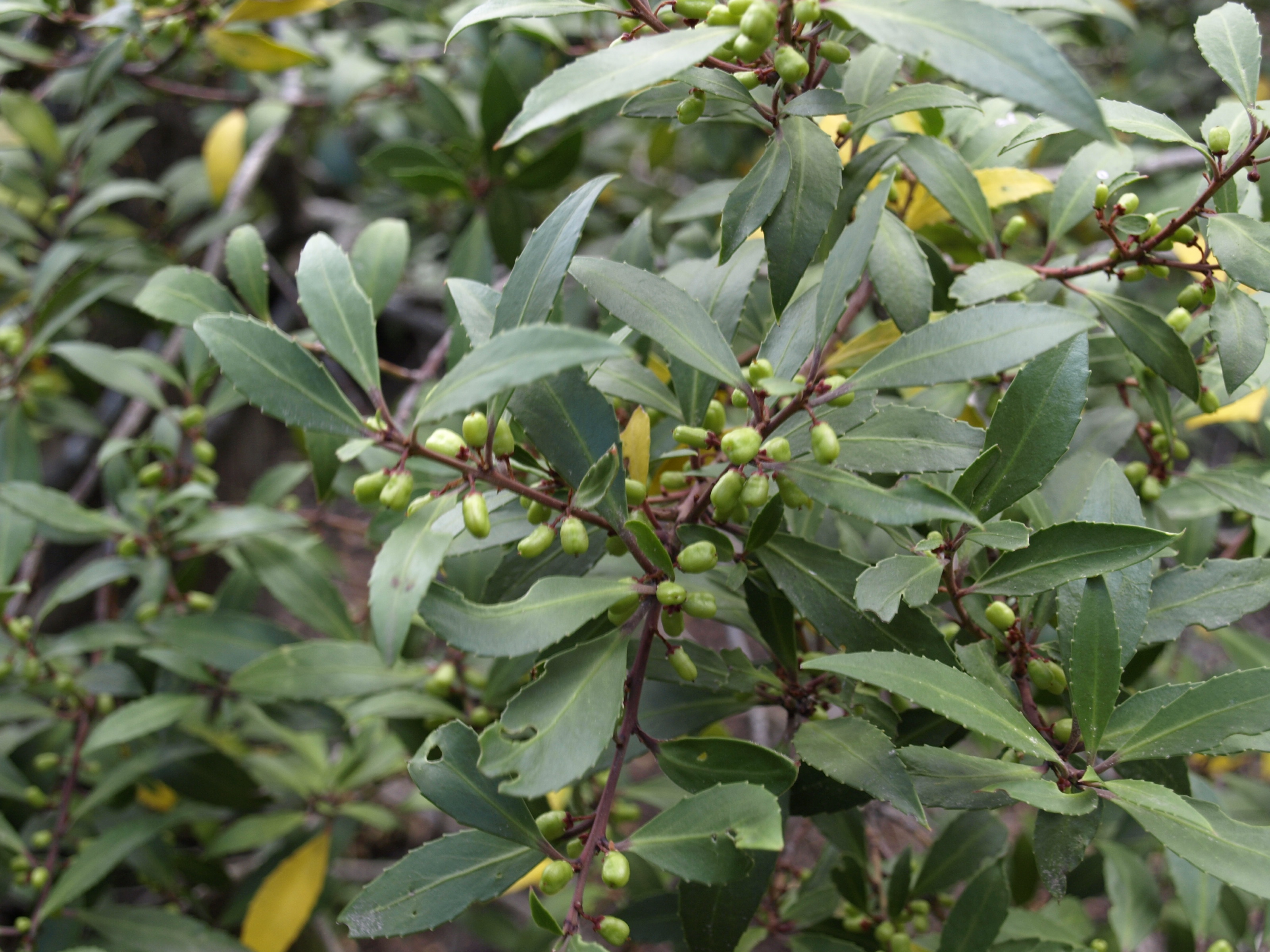 Maytenus magellanica Parque Nacional Laguna del Laja, Chile.